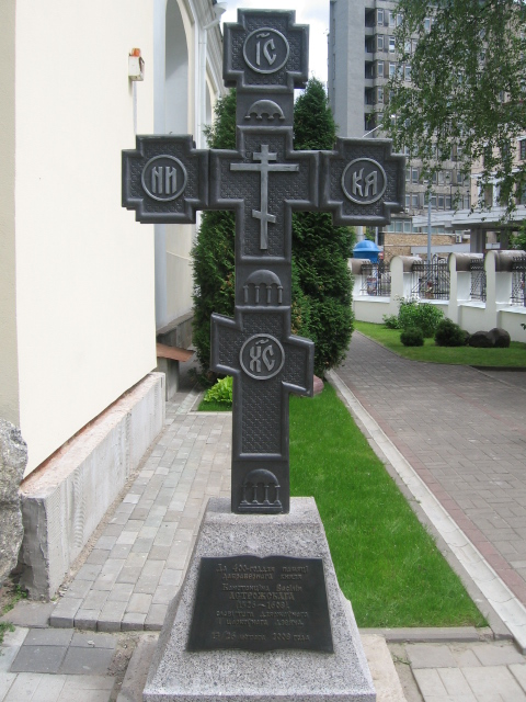 Памятны крыж: "Да 400-годдзя памяцi дабравернага князя Канстанцiна Васiлiя Астрожскага (1506-1608), славутага дзяржаўнага i царкоўнага дзеяча. 13/26 лютага 2008 года"